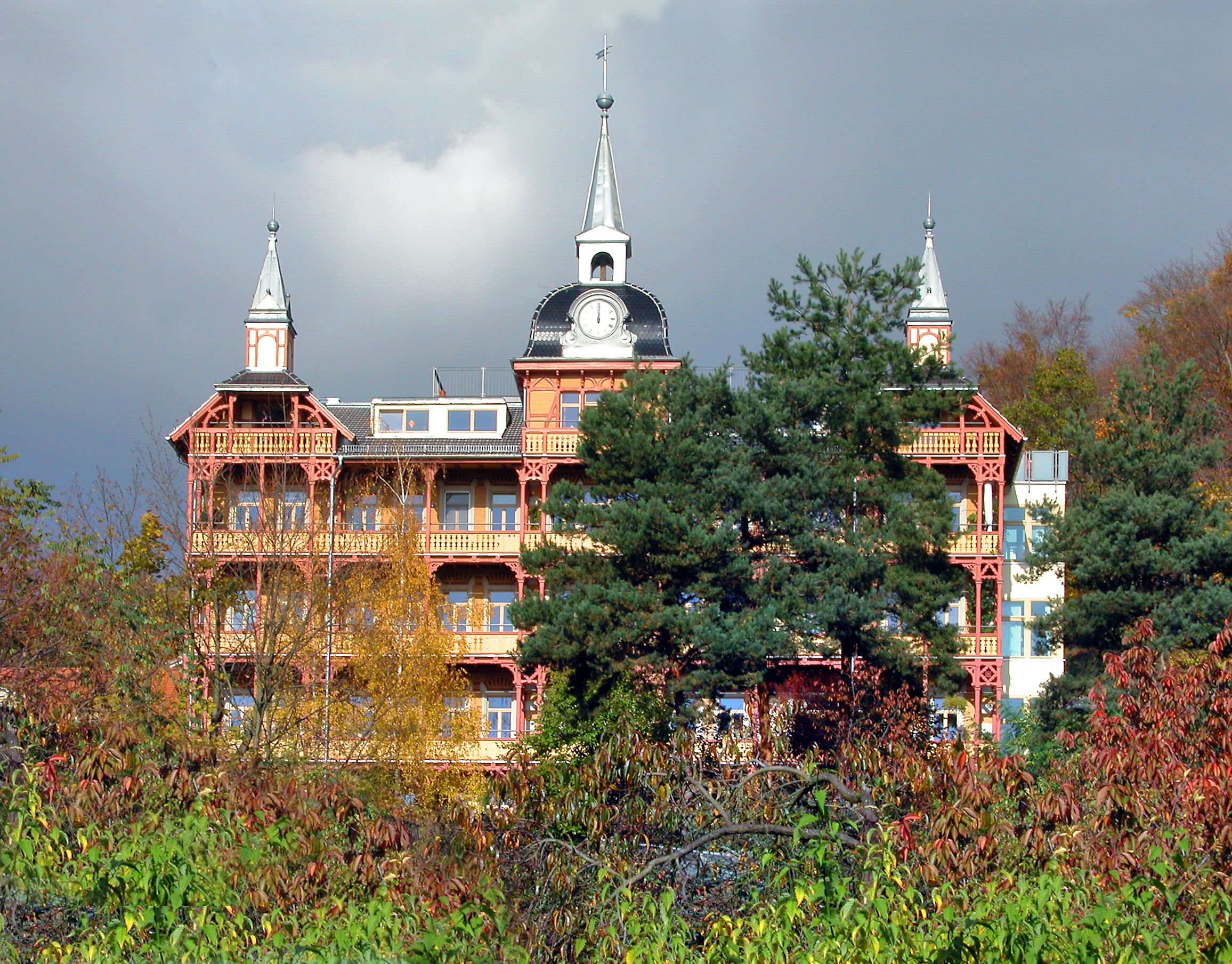 23.10.2008 01445 Radebeul: ehem. Bilz Sanatorium, Schloß Lößnitz, Eduard-Bilz-Str. 53 (ehem. Strakenweg 86). Erbaut 1895, 2006 zu Luxuswohnungen saniert. Sicht von Süden. [DSCN34853.TIF]20081023200DR.TIF&JPG(c)Blobelt